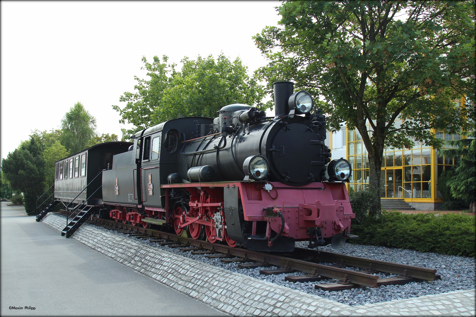 Ehemalige Brohltalbahn Lok V (Px 48 3906) in Melle. Bis 2001 vor dem Vulkan-Expreß im Einsatz. Juli 2016.